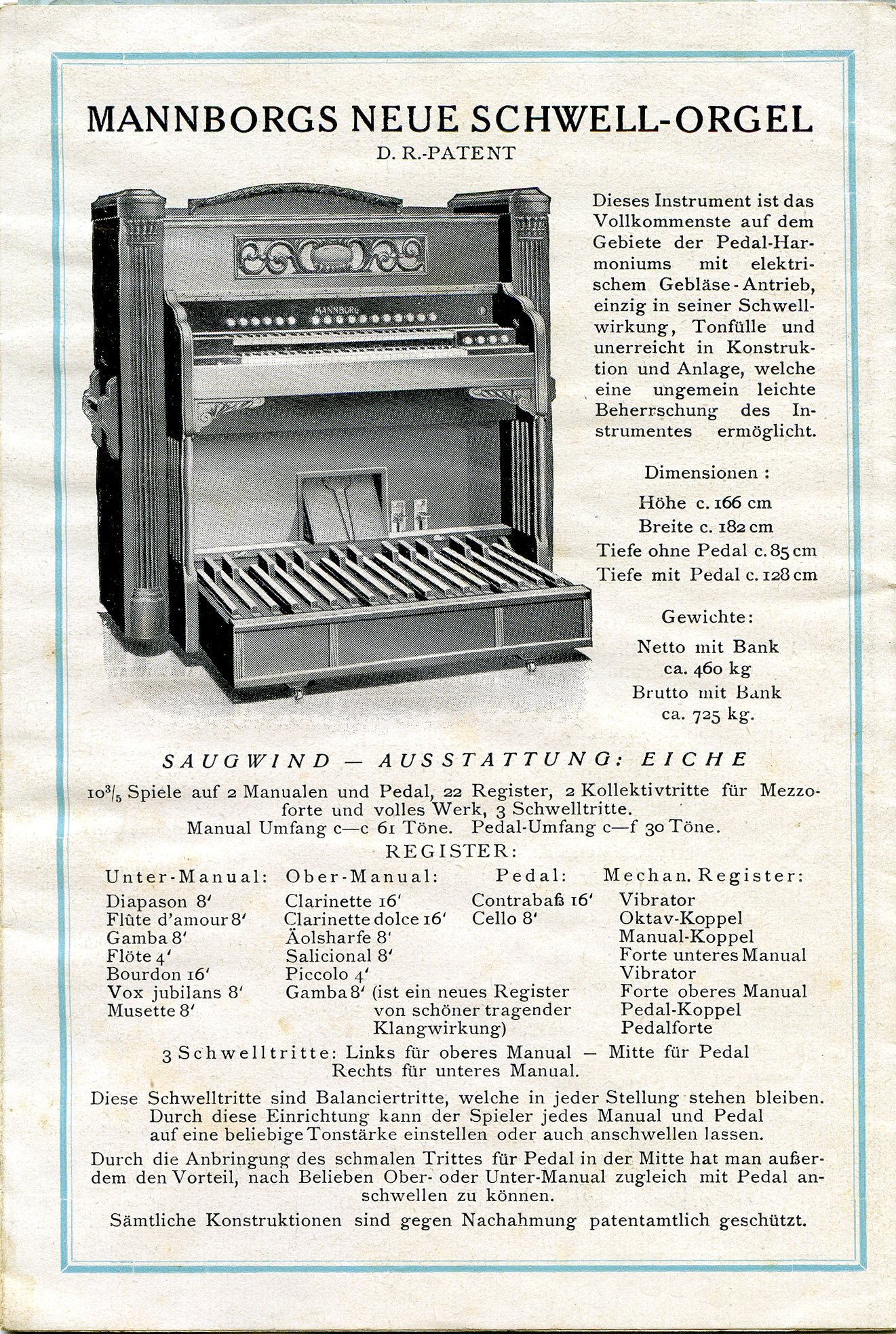 Mannborgs Neue Schwellorgel Details s. Bild